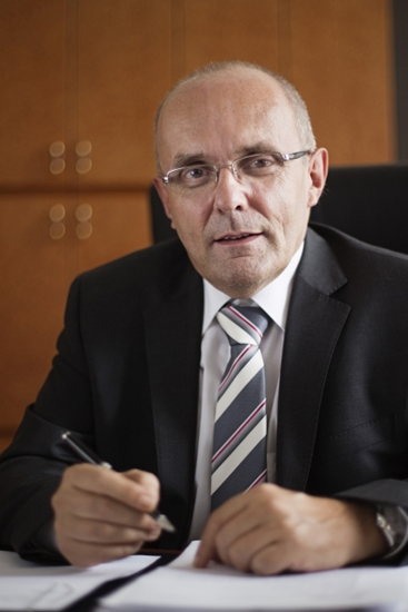 Ing. Kamil Jankovský, ministr.